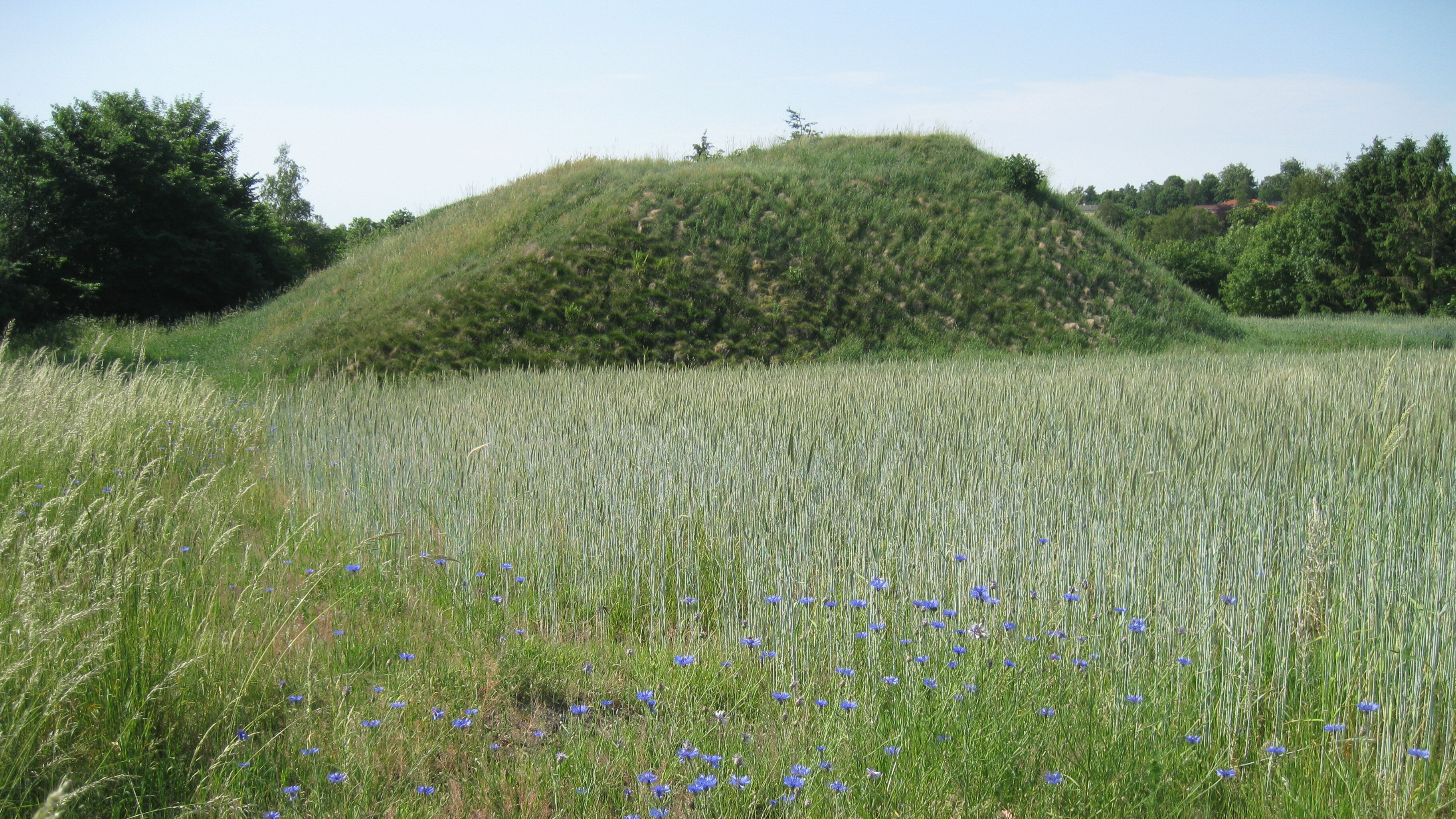 Klejtrup Volde